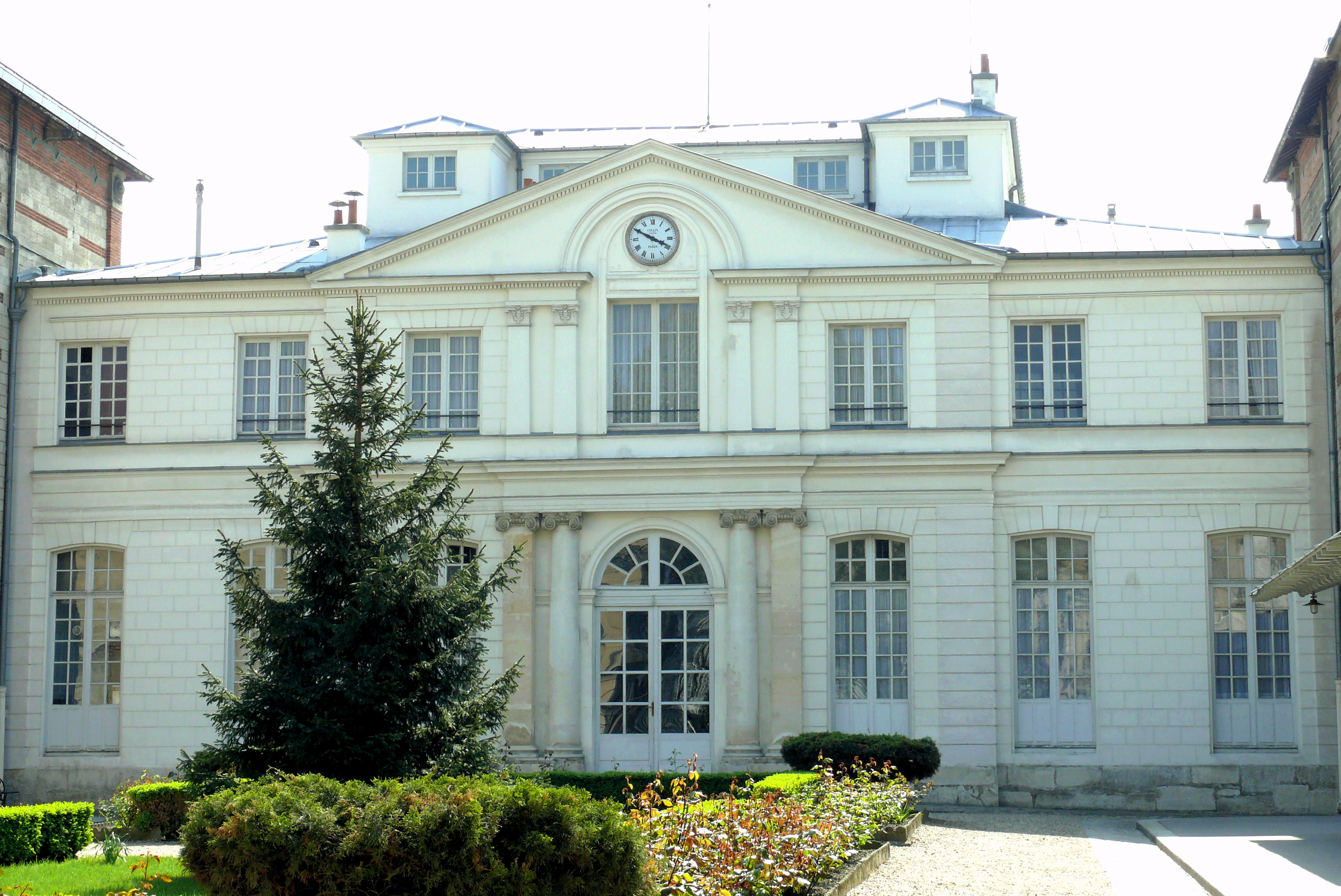 Paris 16ème arrondissement - Ecole Jean-Baptiste Say